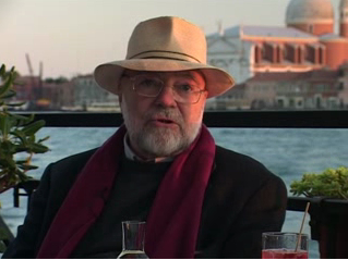 Marcelin Pleynet, Venise, 2006